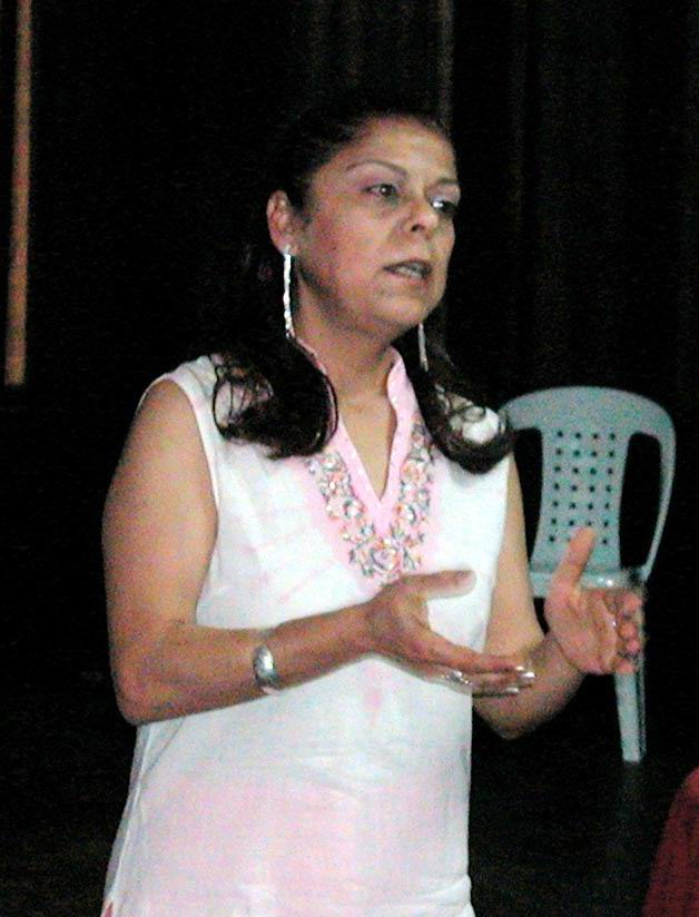 Nurhan Tekerek'in fotoğrafı